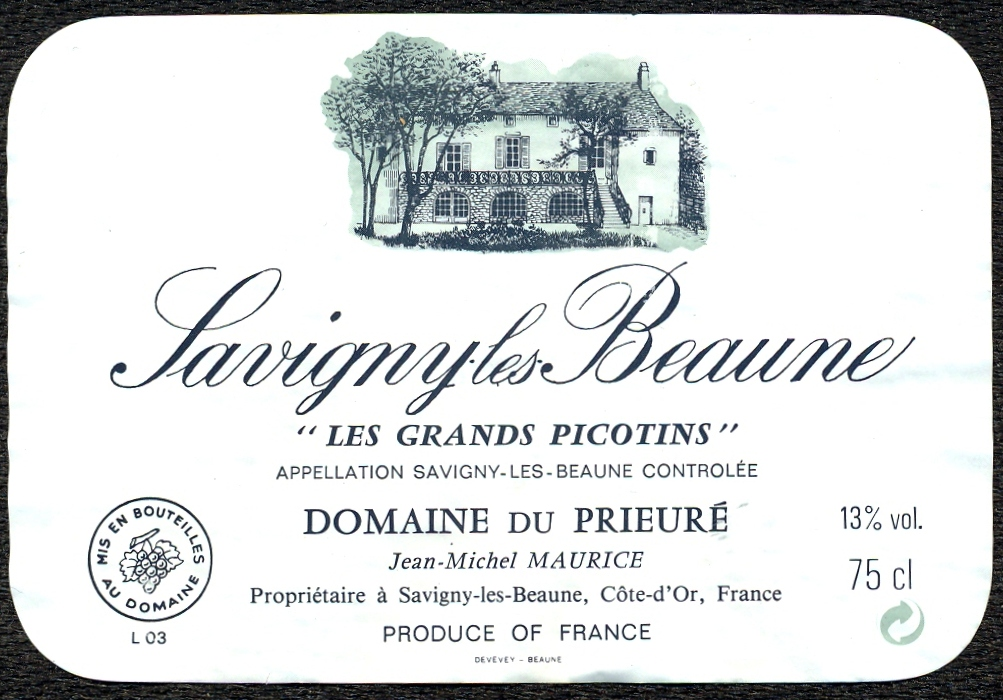 Savigny les Beaune Etikett eigener Scan von User:Ile-de-re 03.02.2007